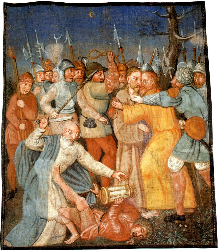 Millstätter Fastentuch, Stift Millstatt